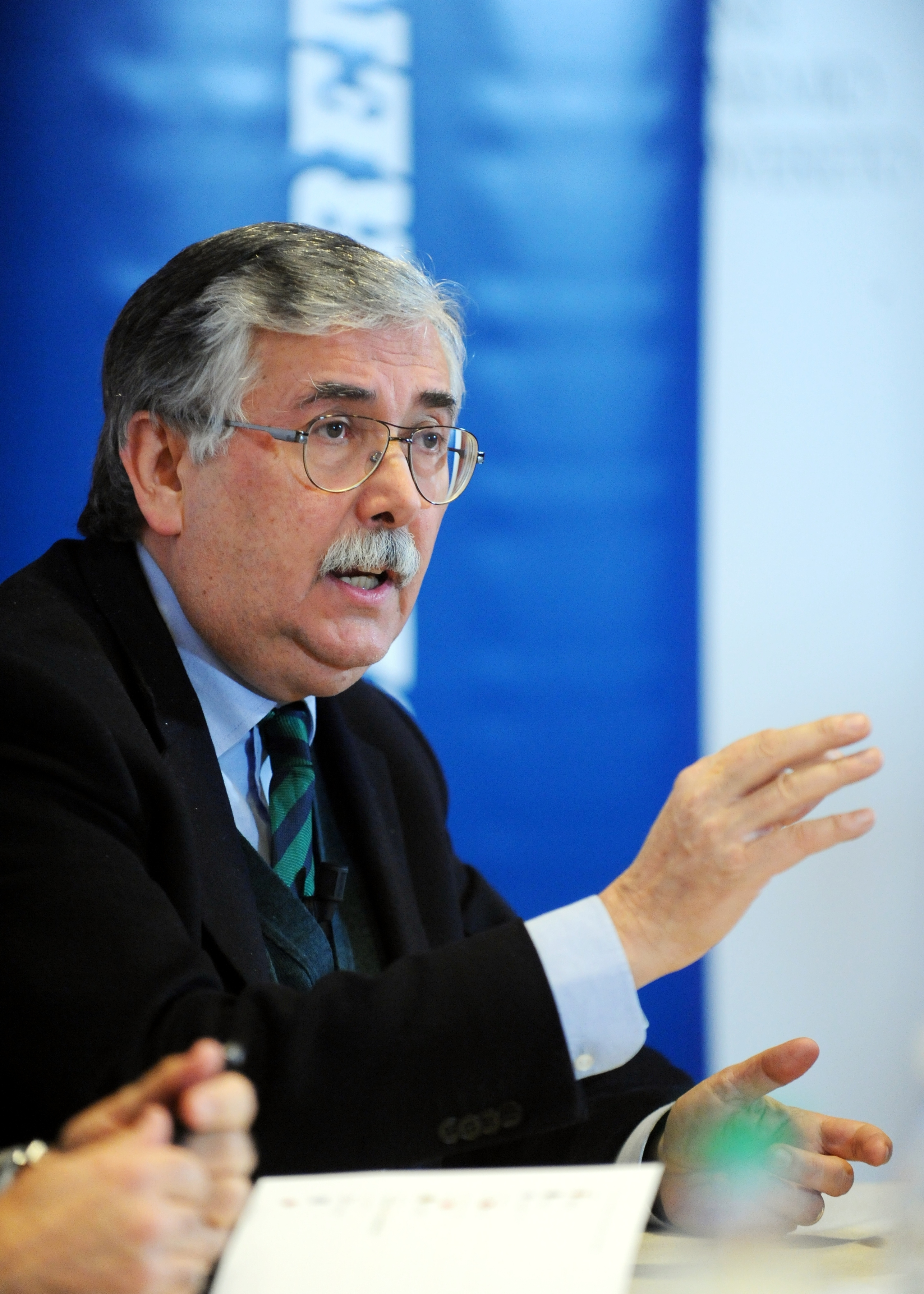 L'editorialista del Corriere della Sera Gian Antonio Stella all'incontro "L'autonomia è troppo speciale?" organizzato dal Corriere del Trentino presso la sala della Fondazione Caritro, Trento.